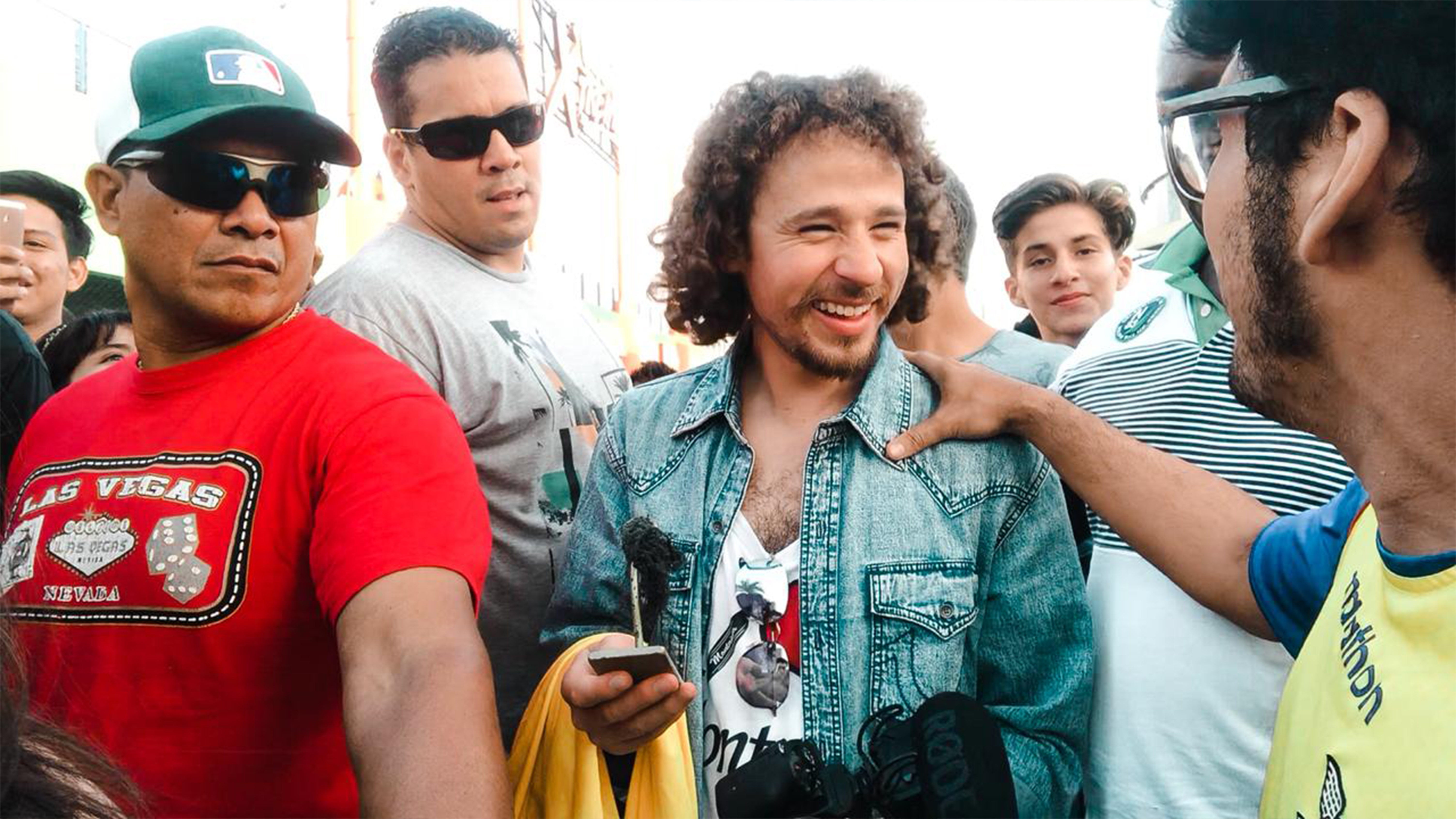 Luisito Comunica en Guayaquil, Ecuador, durante un encuentro con Felipe Crespo, en 2018.